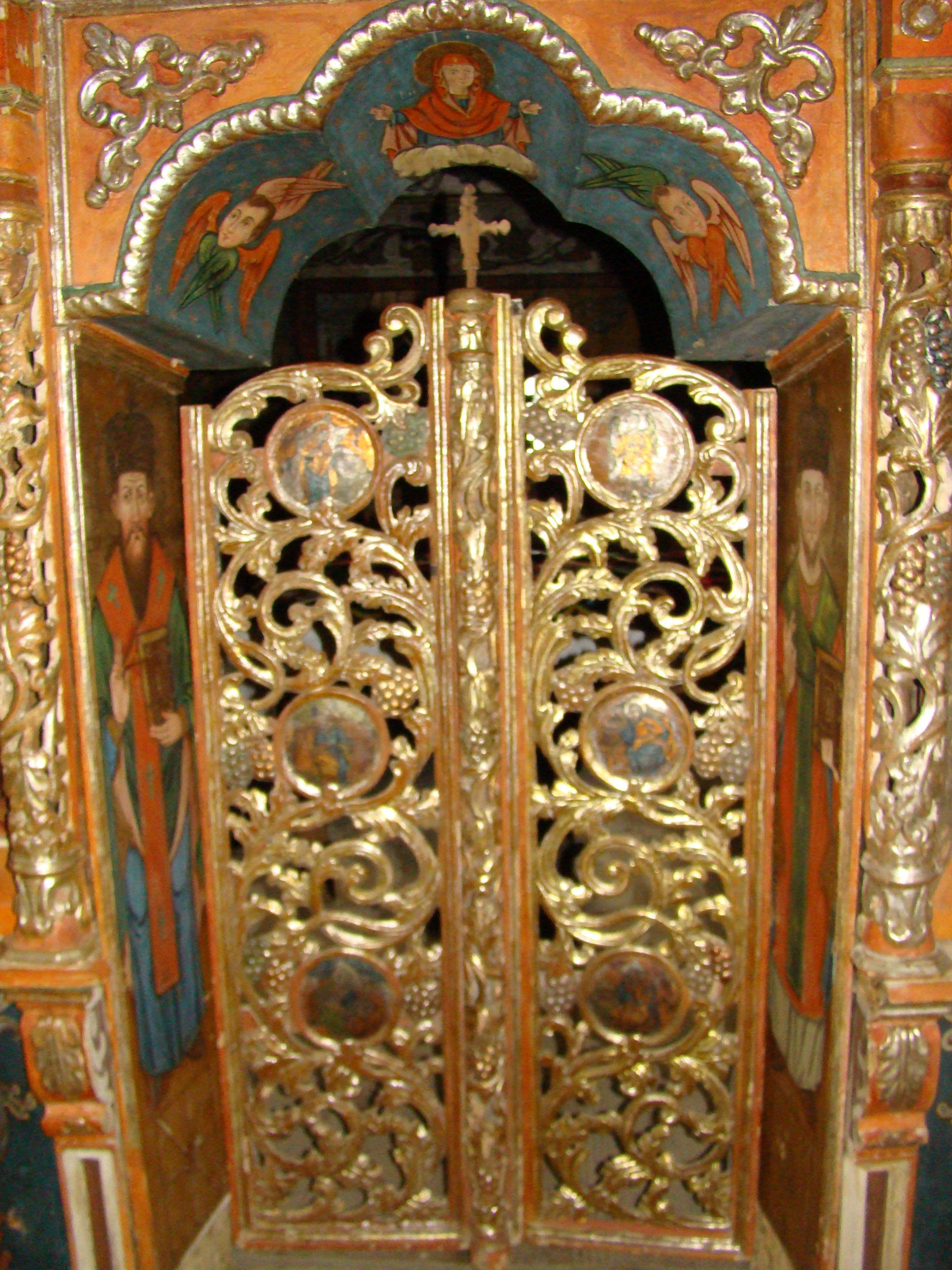 Biserica de lemn "Sfântul Nicolae", sat BOGDAN VODĂ